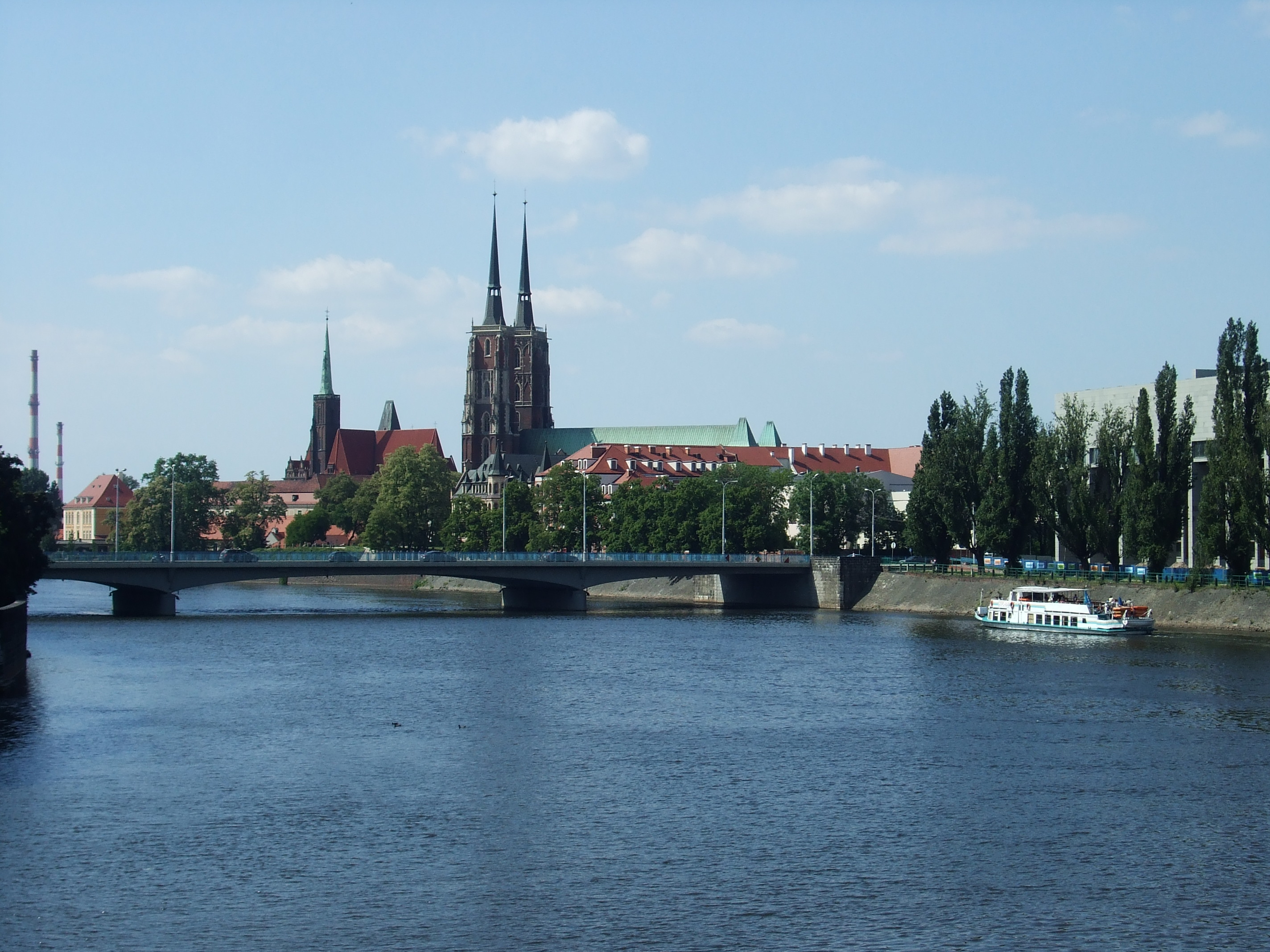 Widok na Archikatedre św. Jana Chrzciciela we Wrocławiu z Mostu Grunwaldzkiego.